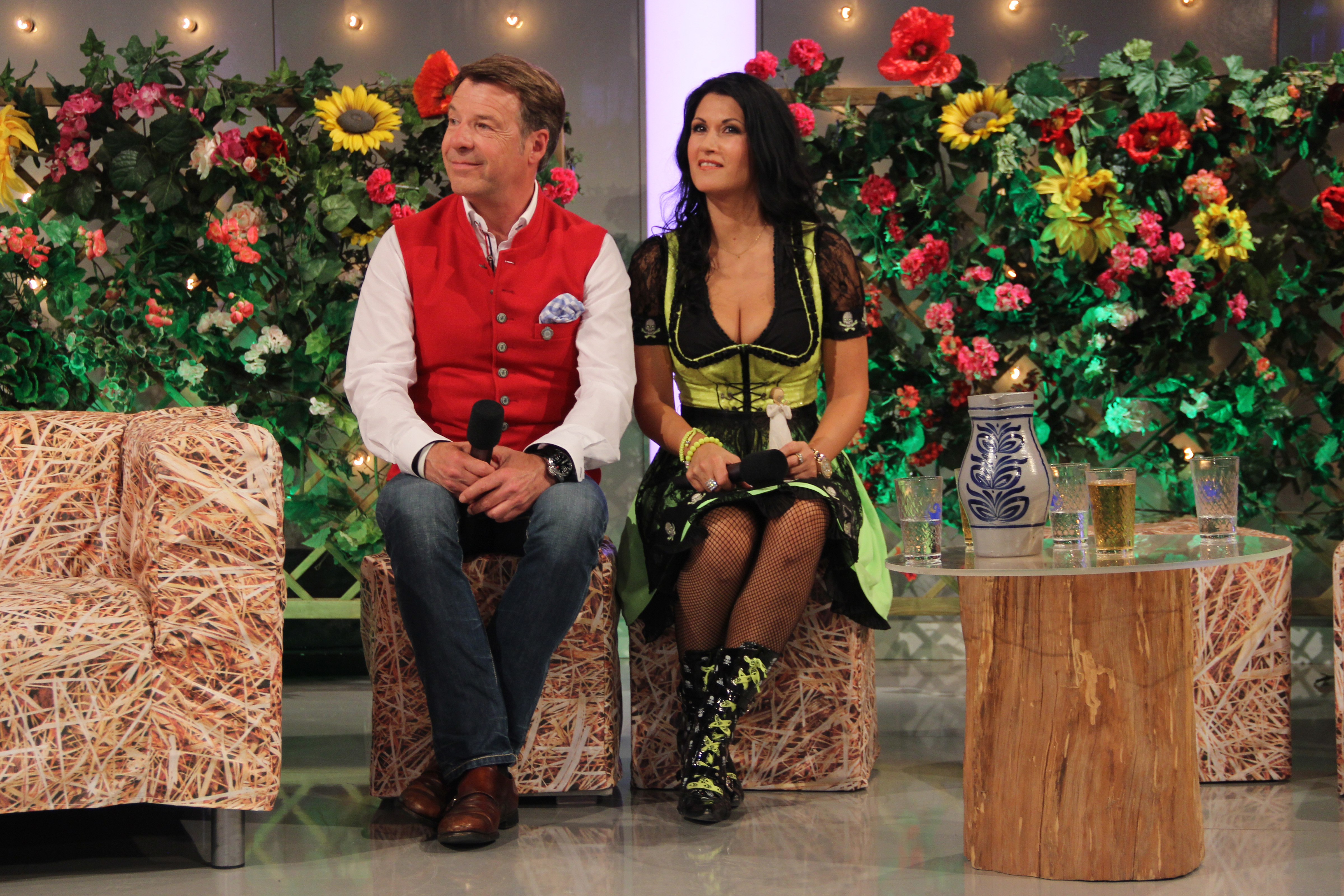 Antonia aus Tirol mit Patrick Lindner bei der Aufzeichnung zu "Hier spielt die Volksmusik" auf dem Hessentag 2015 in Hofgeismar.